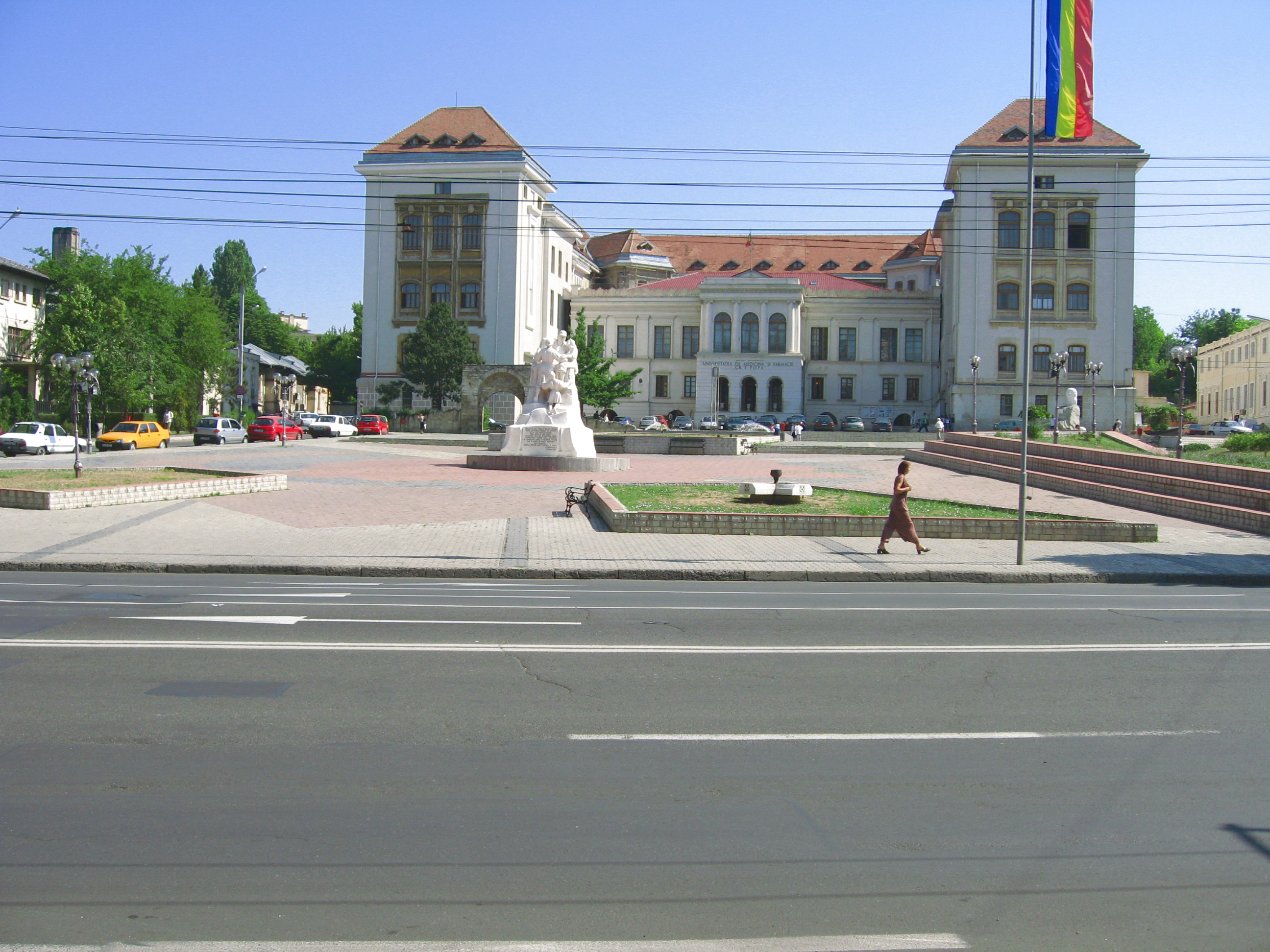 Monumentul Unirii din Iaşi